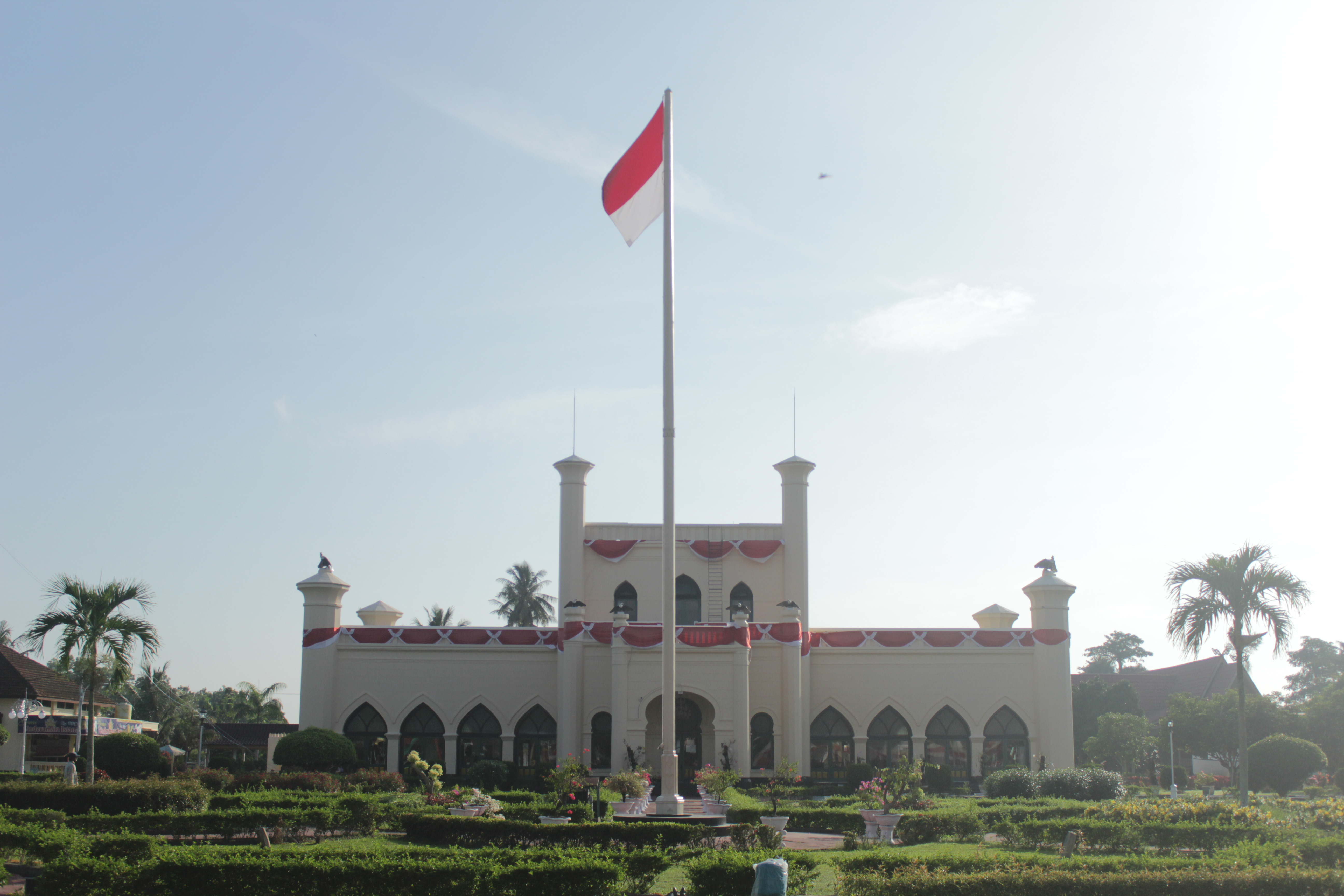 Istana Sia Sri Indrapura pada saat 17 Agustus 2016